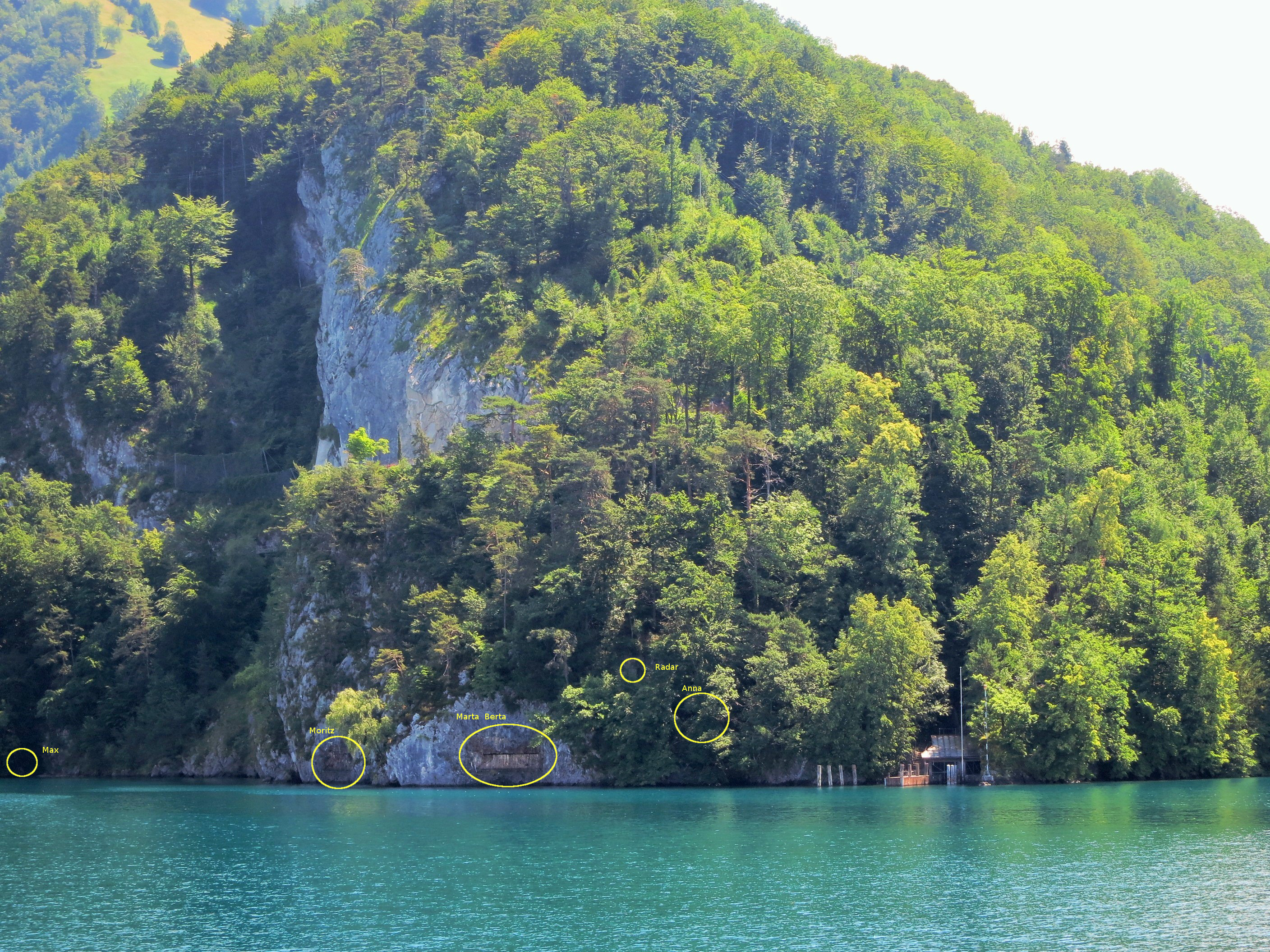 Obere Nas, Vitznau LU, Schweiz: Geschütze mit Namen